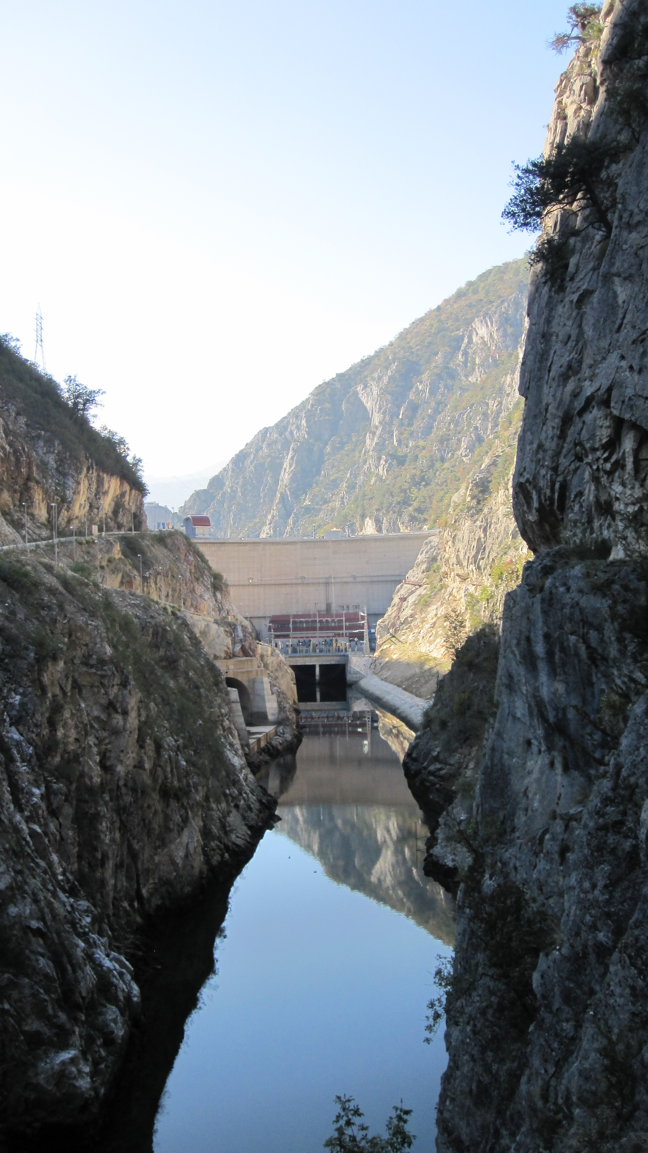 Хидроелектрична централа „Св. Петка“ (оддалеку).